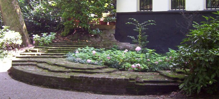 Opgegraven fundatie van een toren van het kasteel van Gouda, eigen foto gebruik vrij Categorie:Afbeelding Gouda